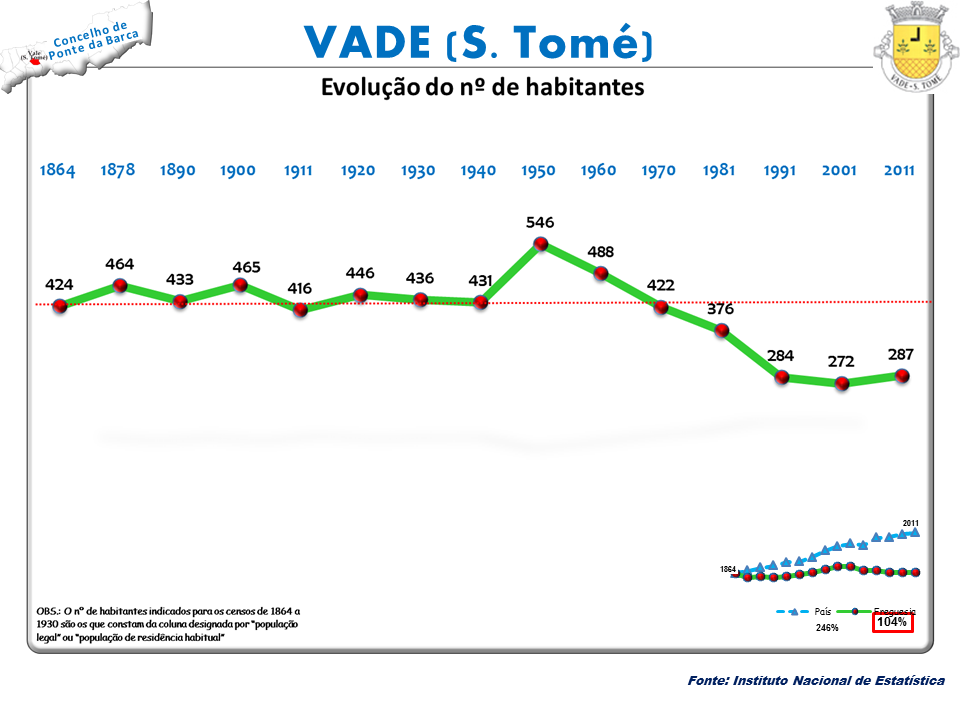 Censos 1864/2011